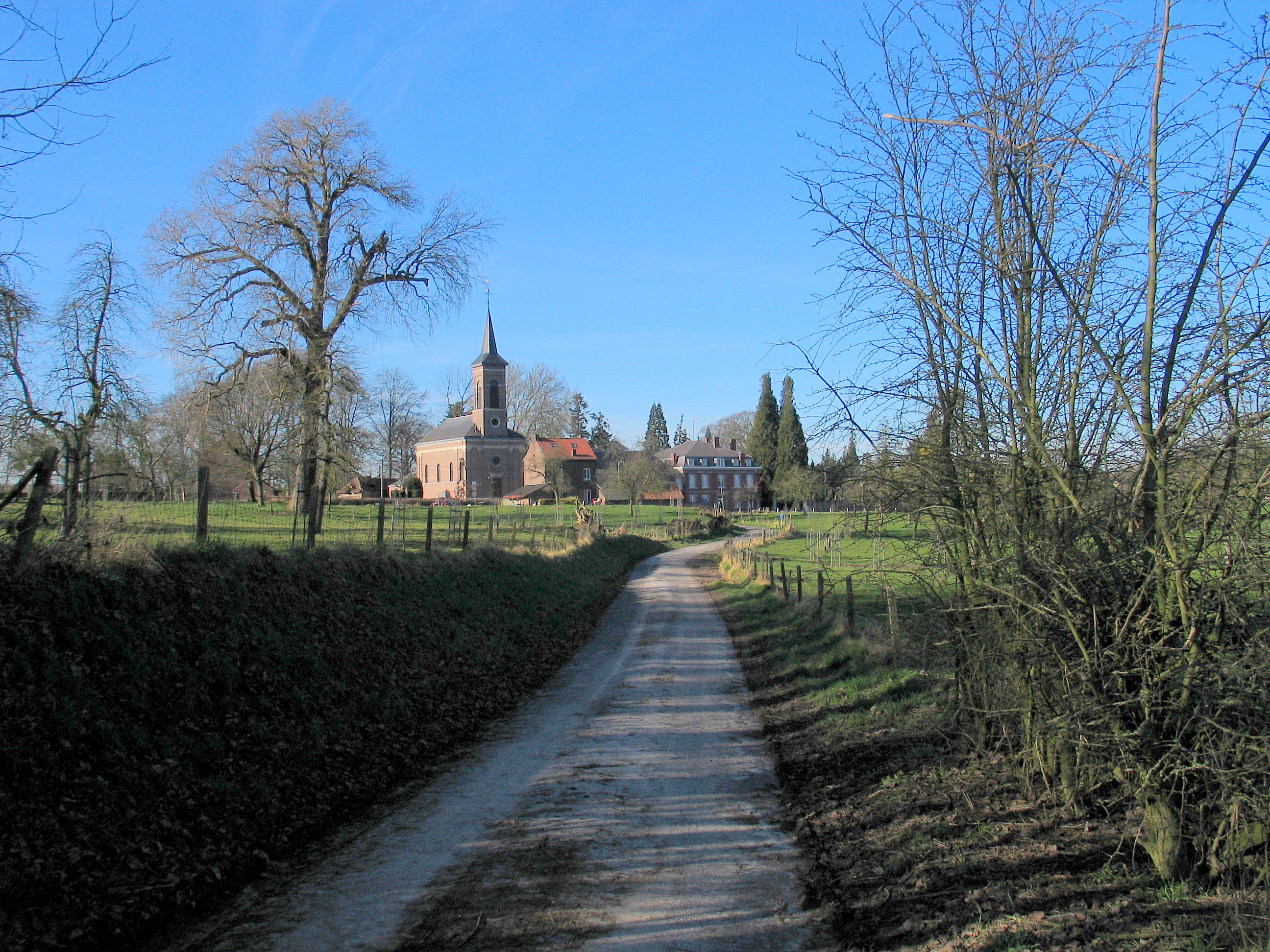 Village of Bommershoven, Borgloon, Belgium